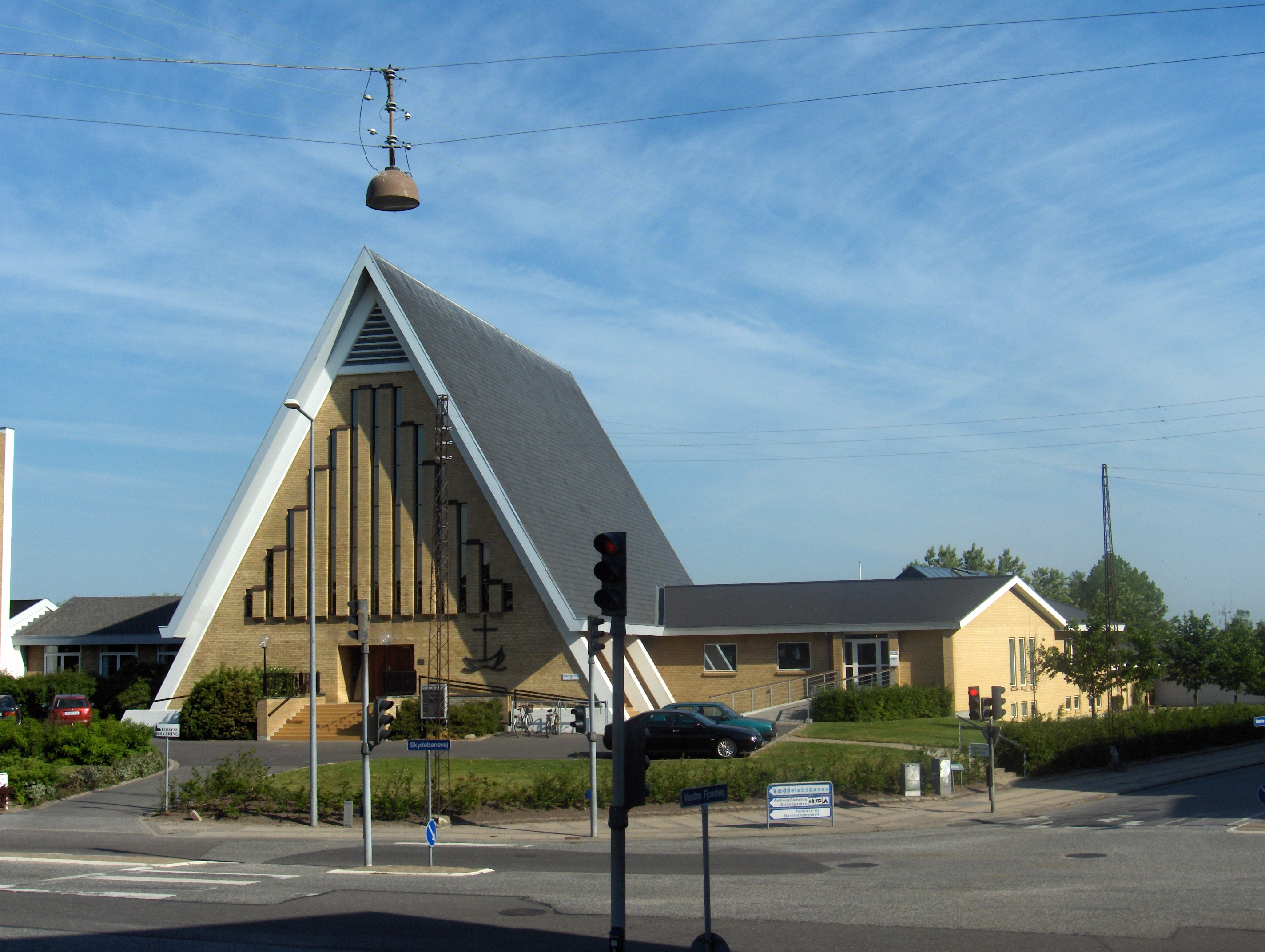 Vesterkær Kirke i Aalborg